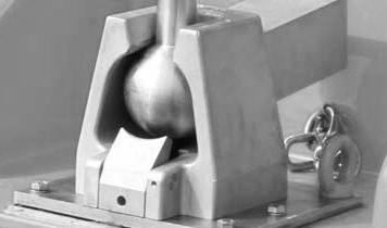 Nouveau système à bord des embarcations de survie.